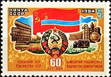 Почтовая марка СССР. Узбекская ССР. Номер в каталоге ЦФА 5568